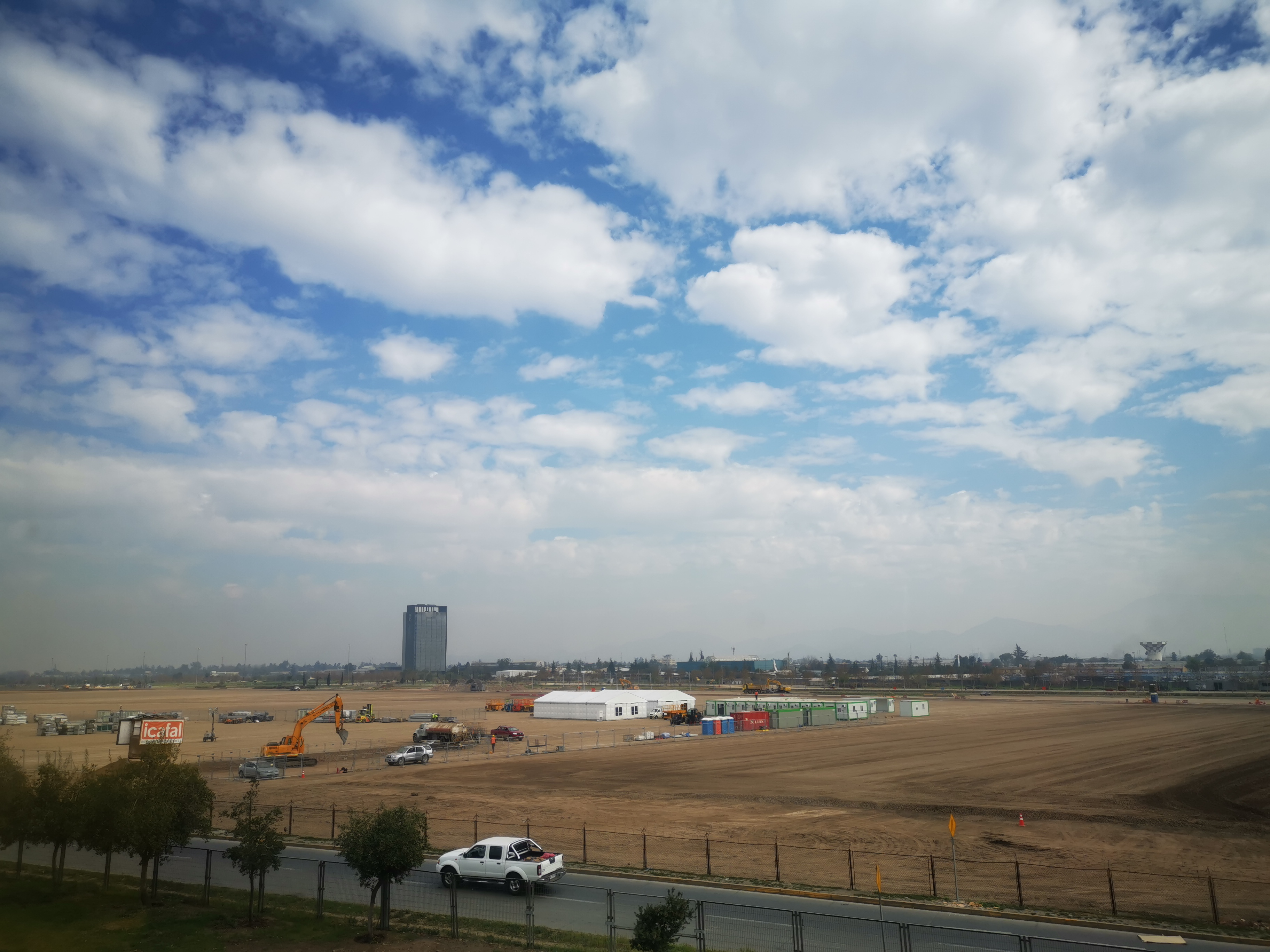 Trabajos de preparación para la infraestructura de la conferencia COP25, en la Ciudad Parque Bicentenario de Santiago de Chile.